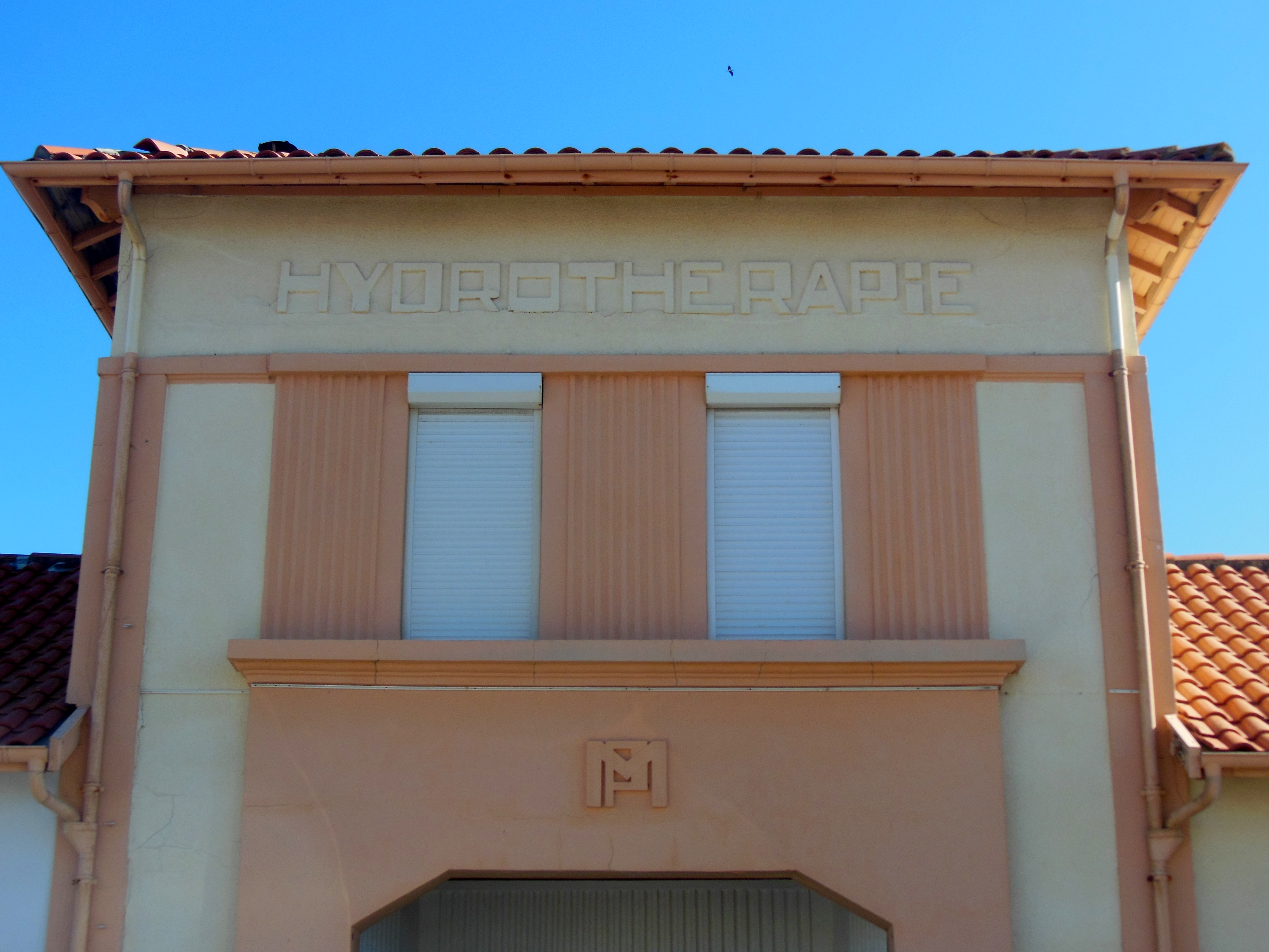 Hydrothérapie de Mimizan, façade Art Déco (département français des Landes)